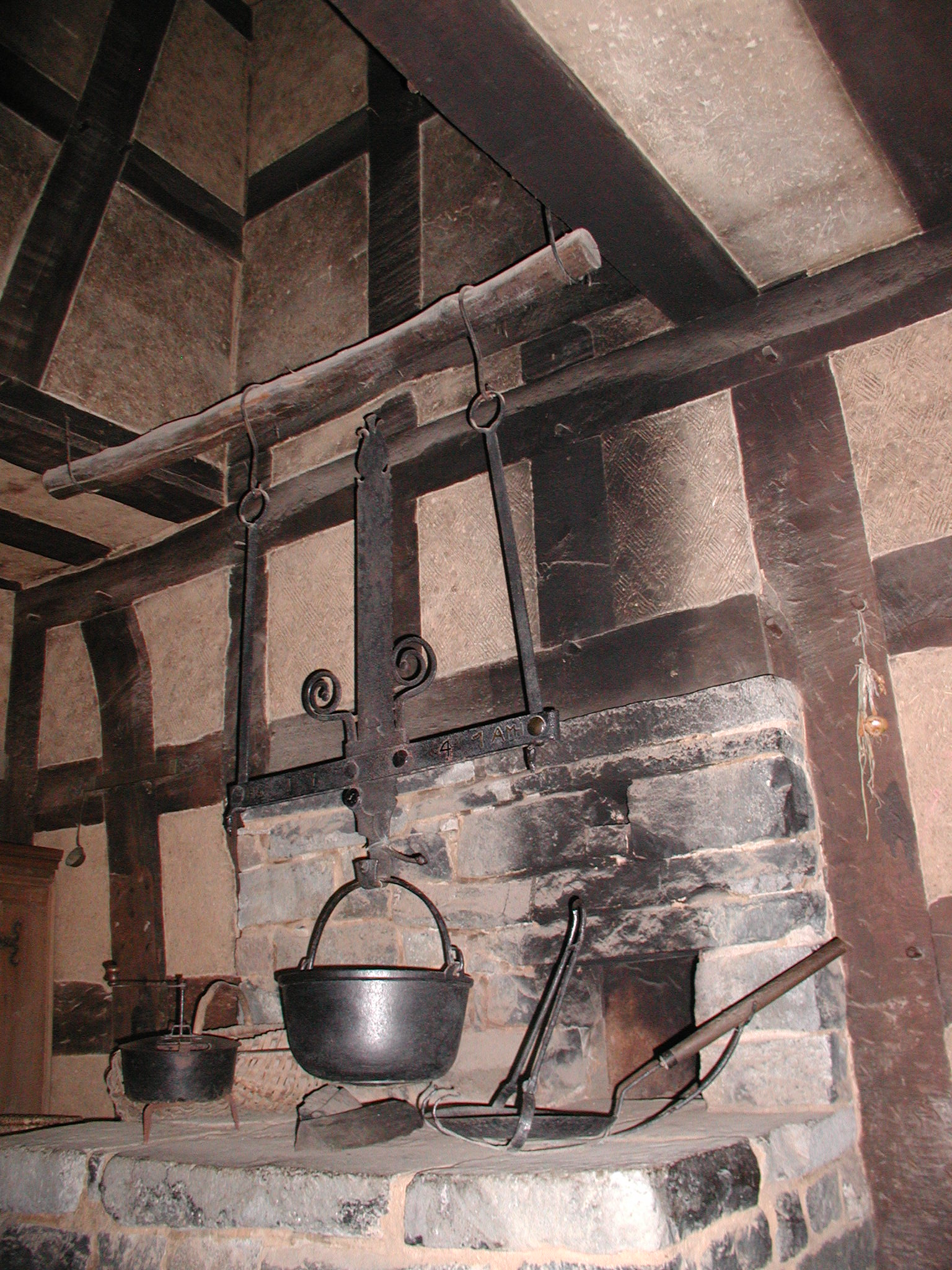 Rheinisches Freilichtmuseum Kommern, Herdstelle